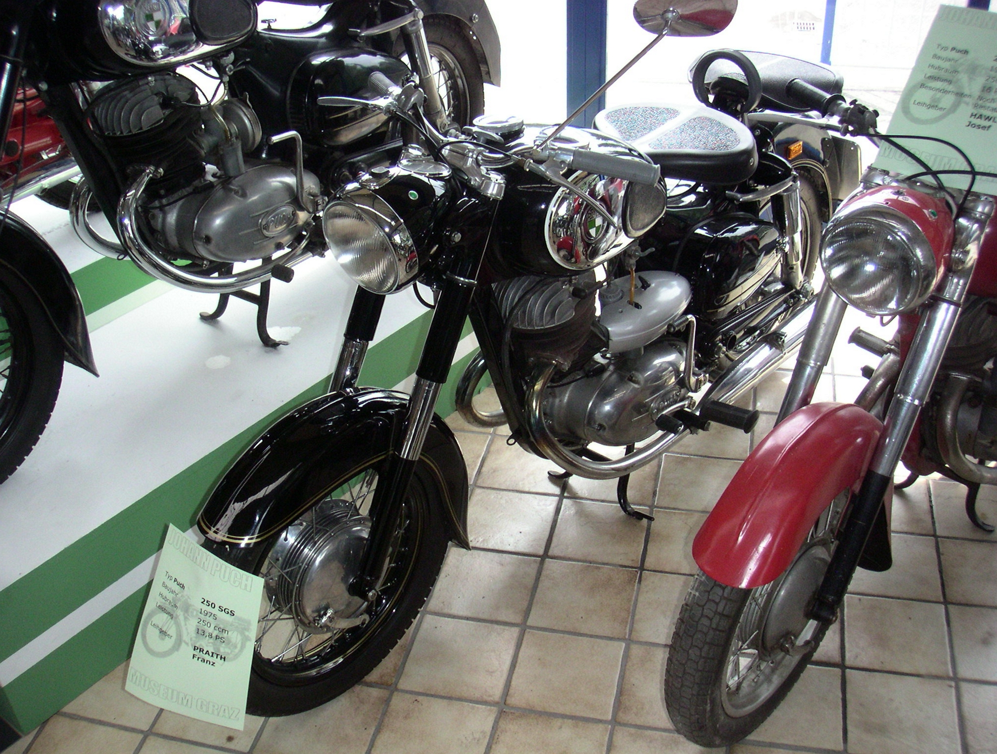 Puch 250 SGS, ausgestellt im Johann Puch Museum Graz, Mai 2004